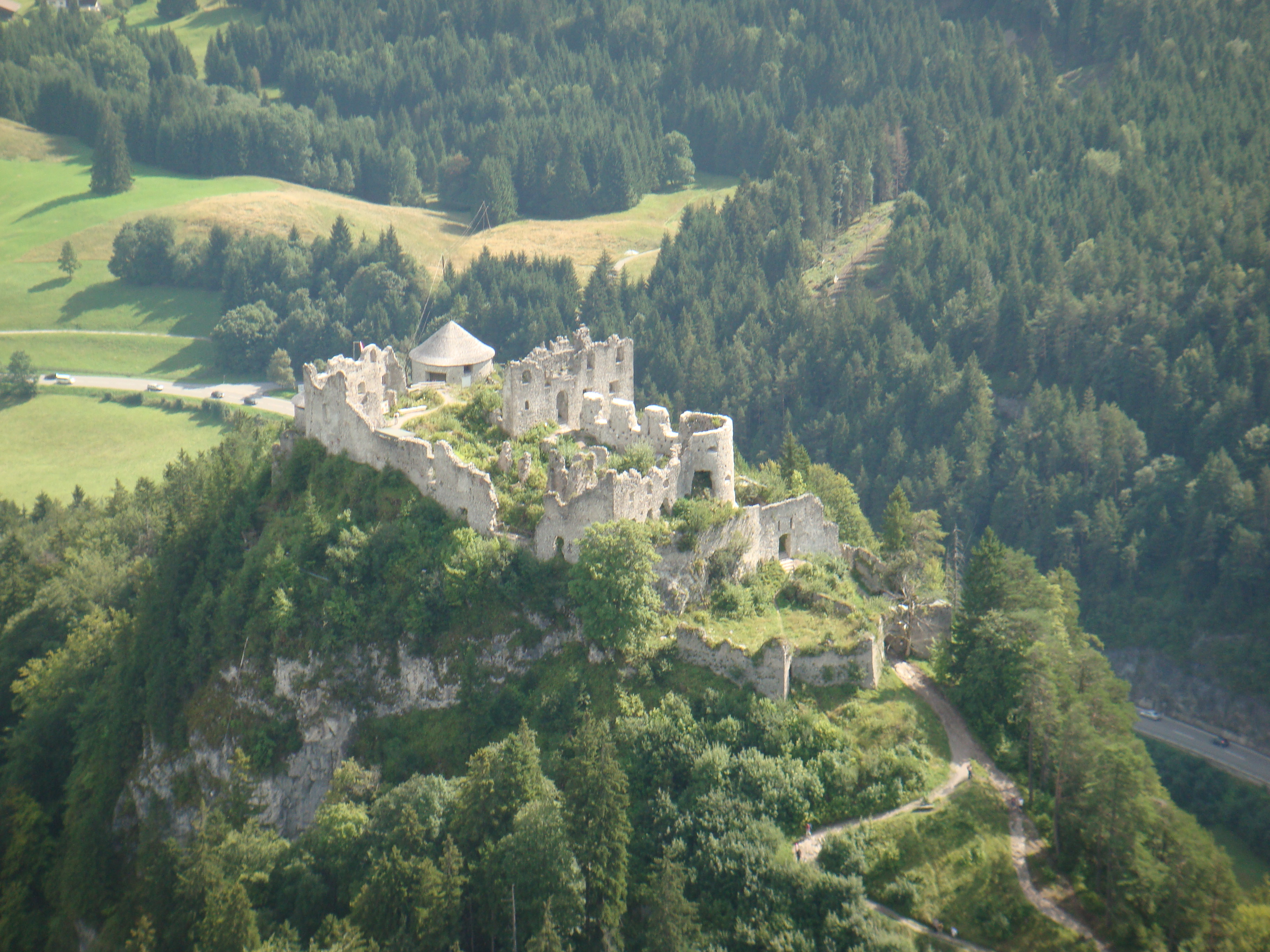 Ruine Ehrenberg